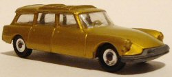 Husky modelauto van een Citroën DS Safari